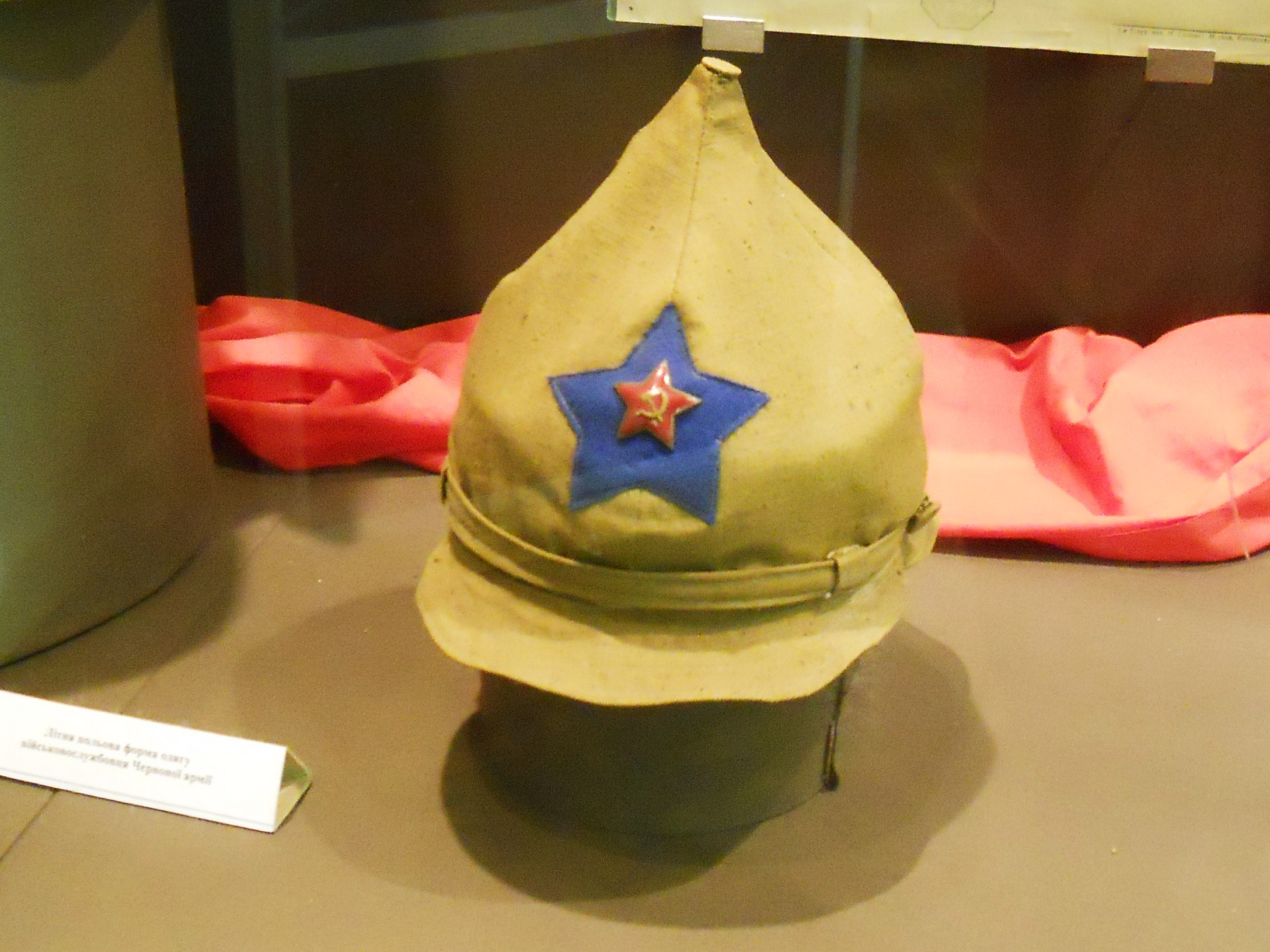 kiev ukraine 966 army museum (15)